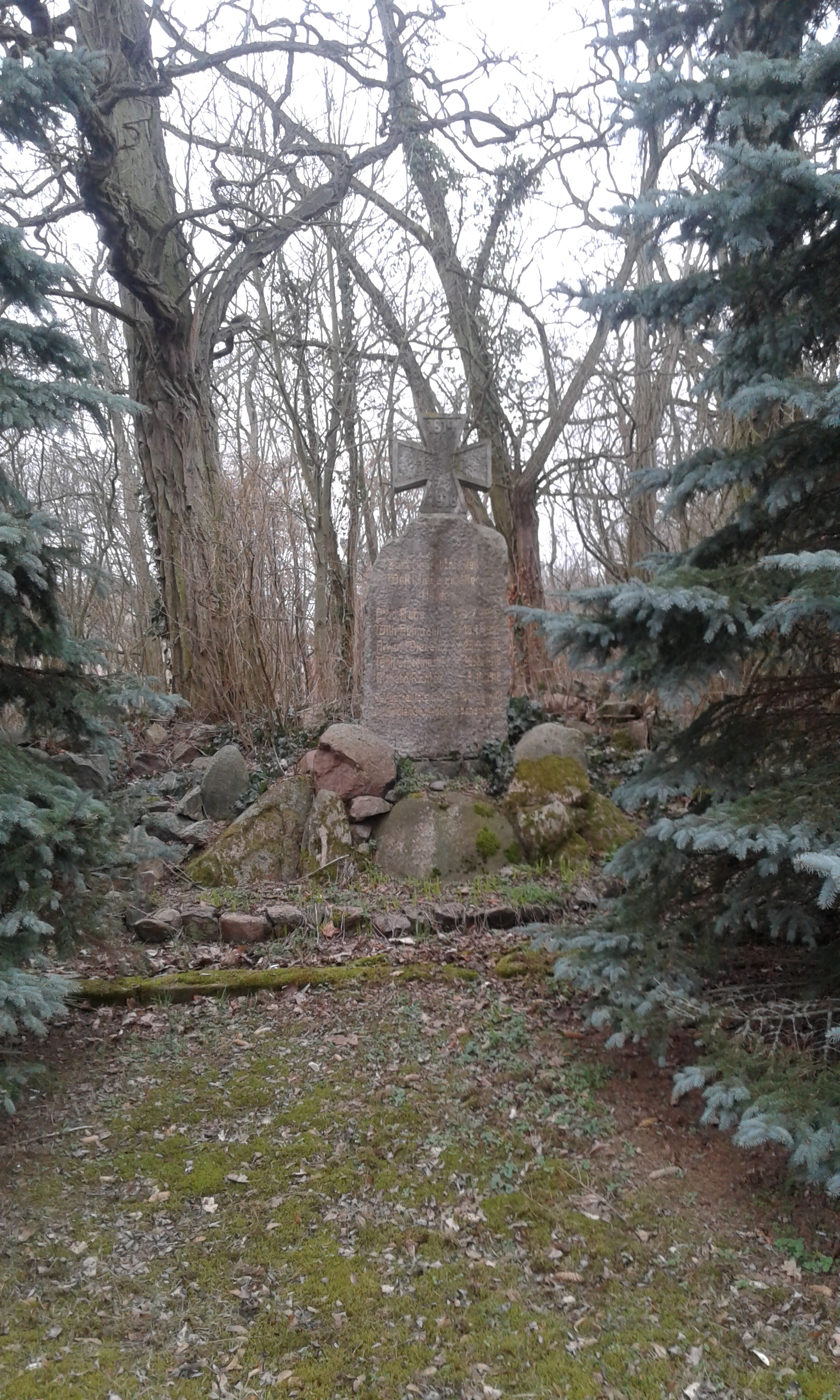 Kriegerdenkmal